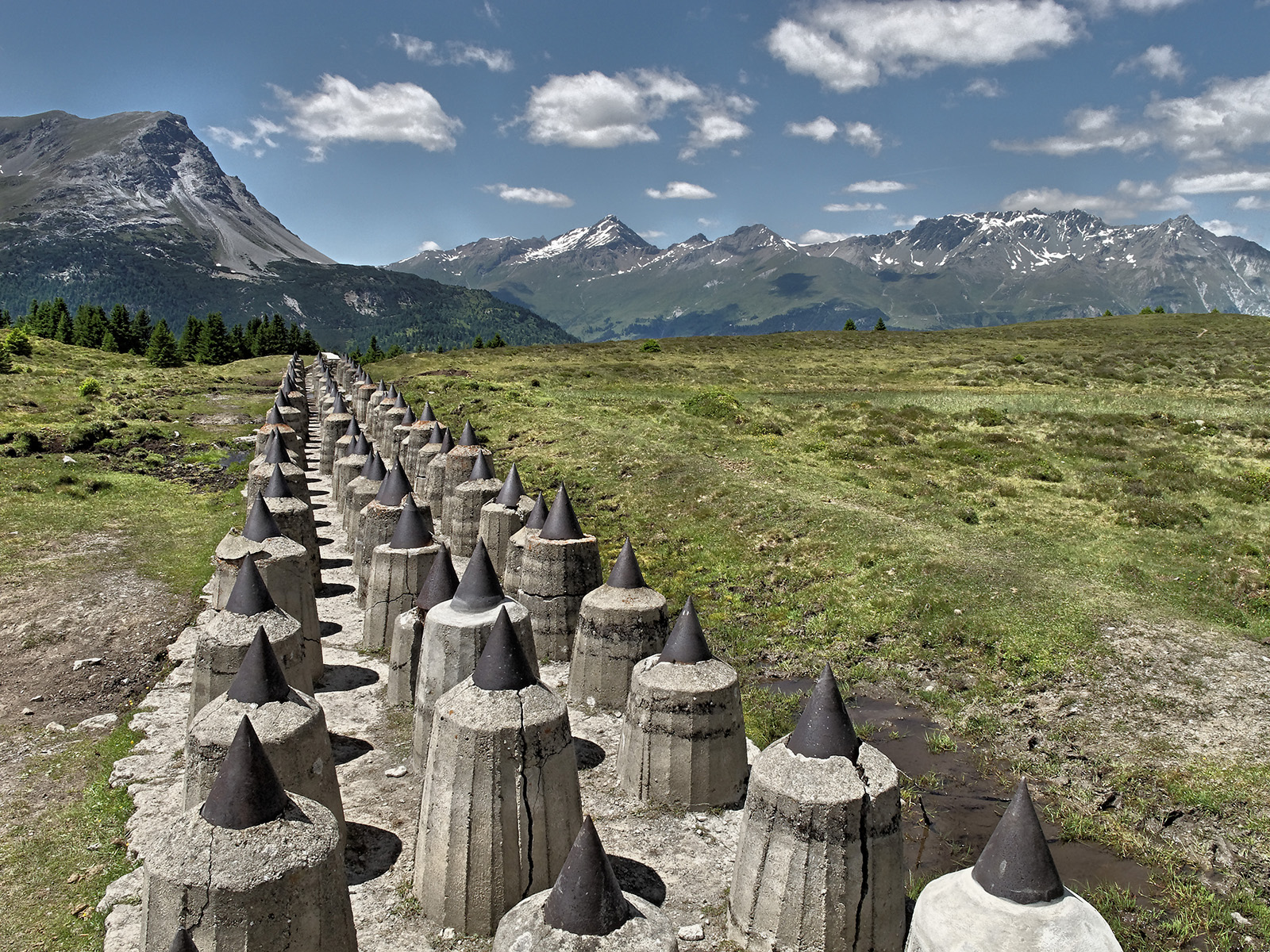 Sbarramento Pian dei Morti